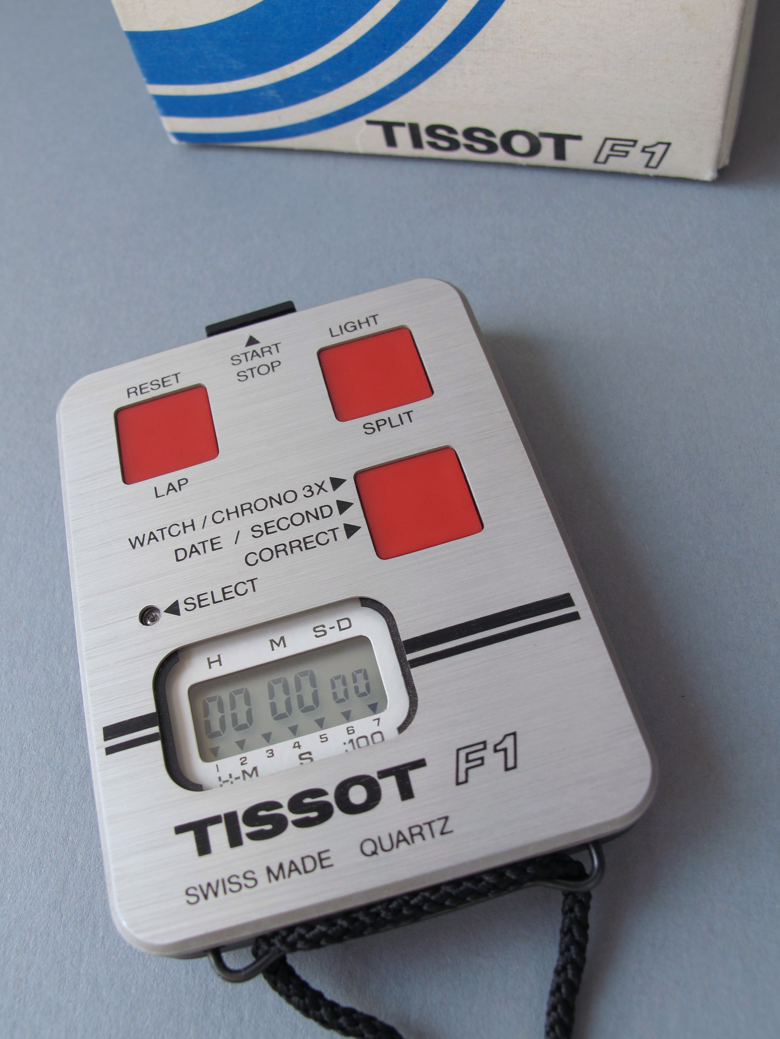 Tissot F1 LCD-Stopuhr